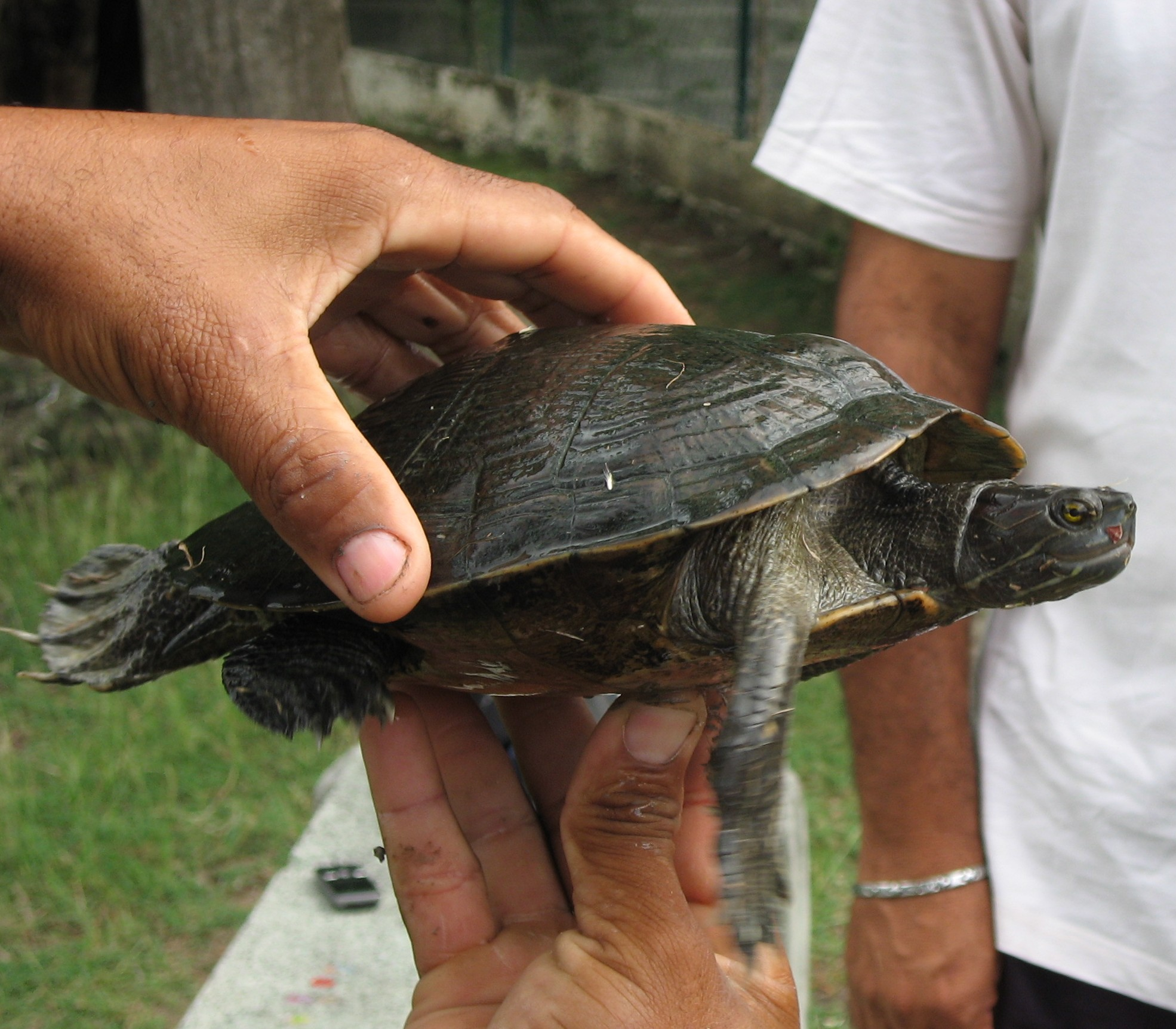 Trachemys stejnegeri à la réserve naturelle de Terre de base aux Saintes en Guadeloupe